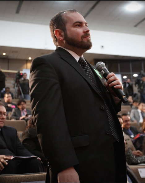 Raul explicando a legisladores la recomendación de aprobar el cannabidiol